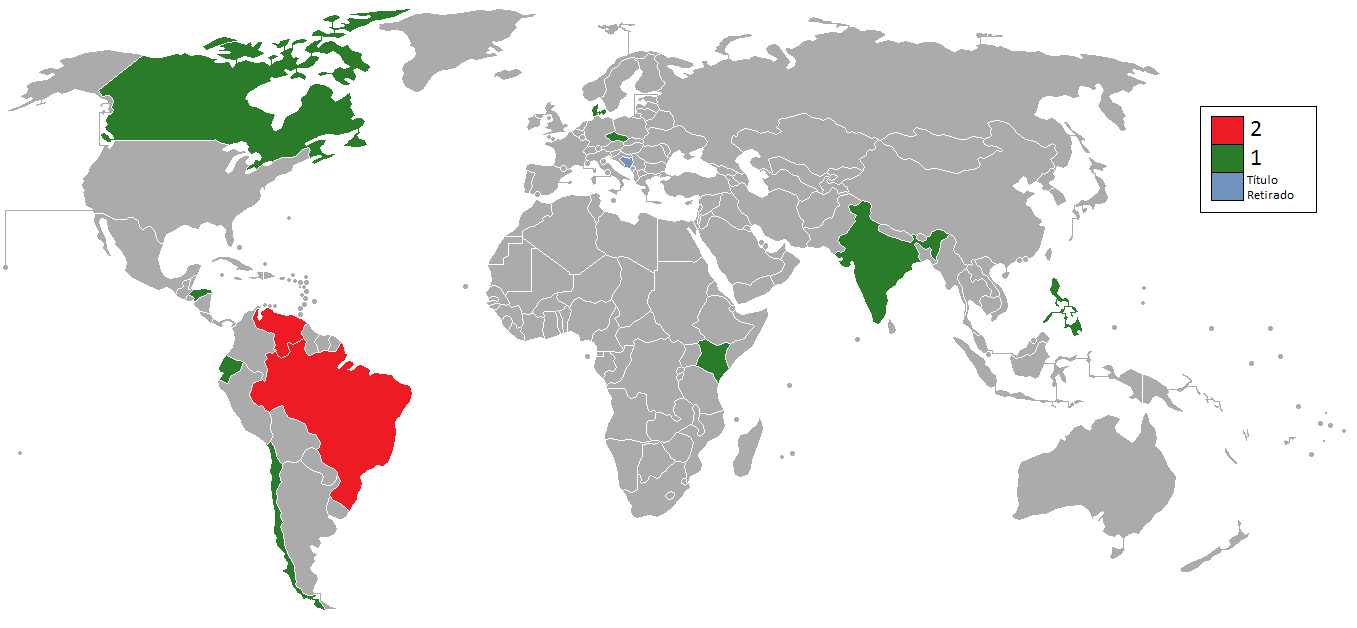 Mapa de los países ganadores de Miss Tierra hasta 2013